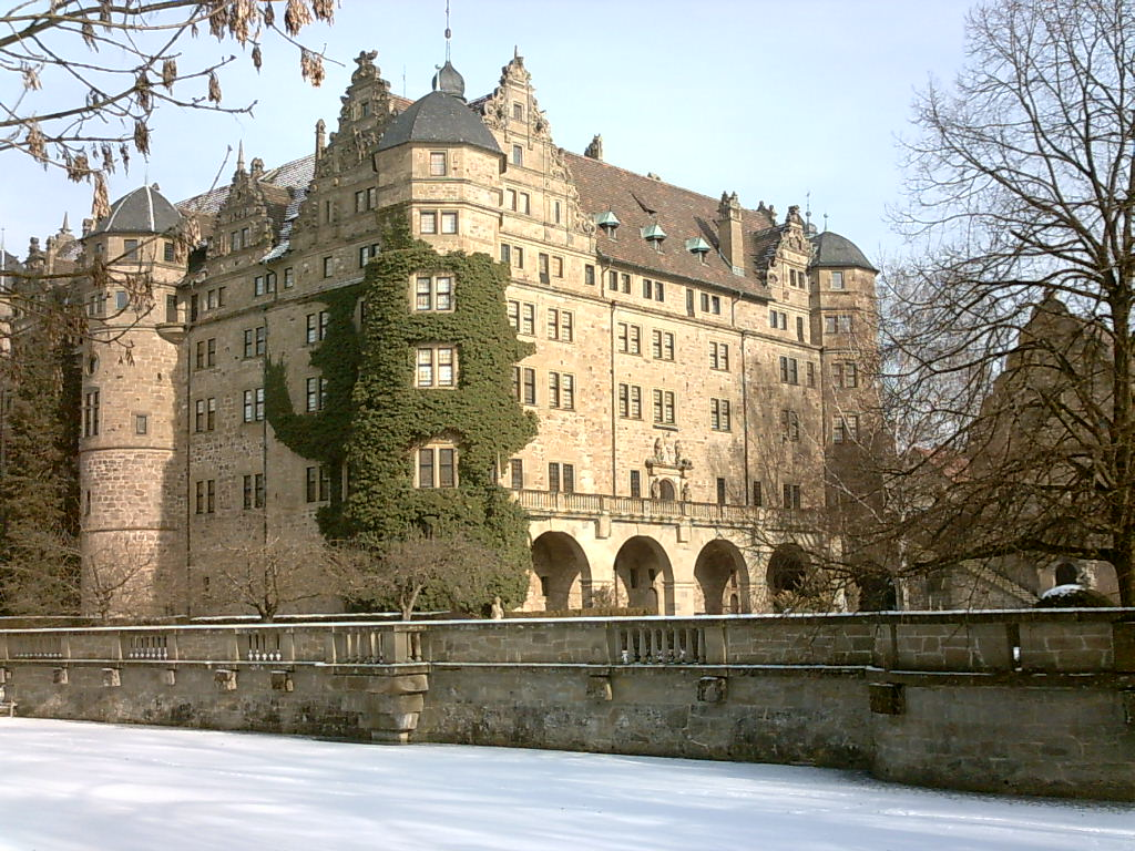 Schloss Neuenstein (Hohenlohe), selbst fotografiert, Januar 2006